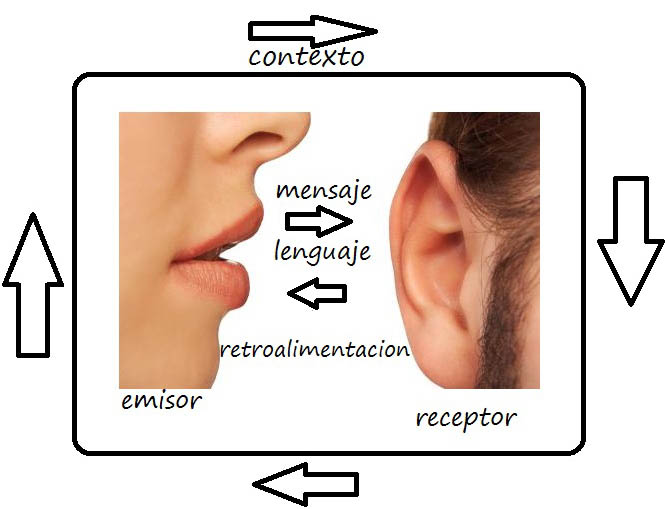 Esquema de comunicación ideado por la Escuela Invisible (Escuela de Palo Alto)